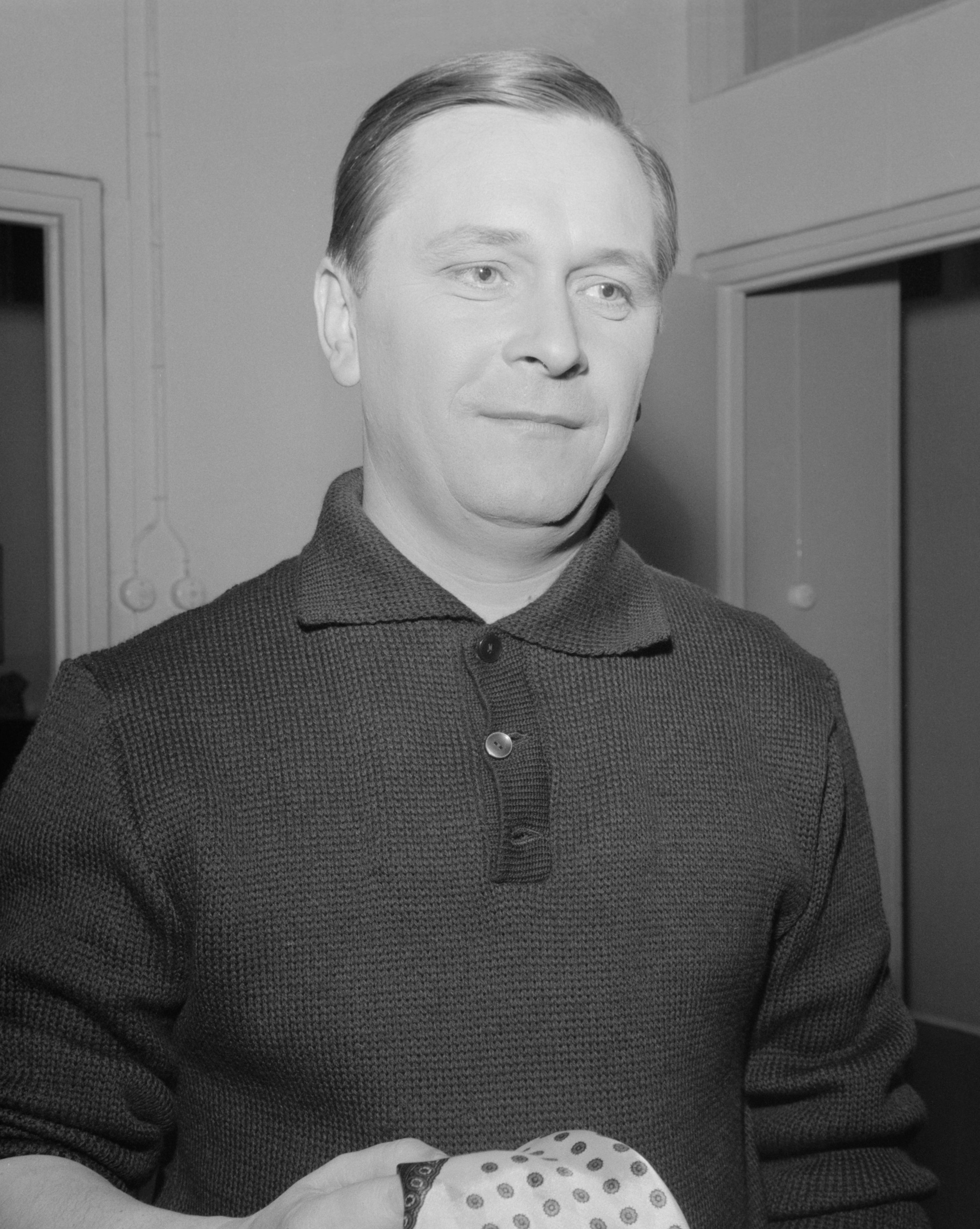 Leo Jokela